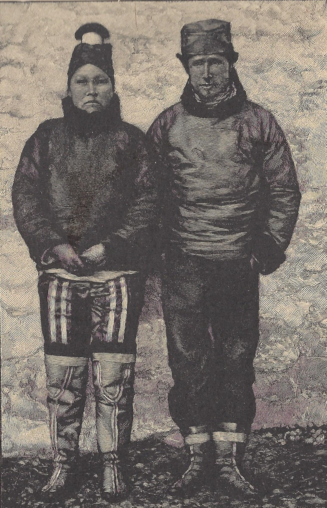 Fotografie eines wohlhabenden grönländischen Ehepaars